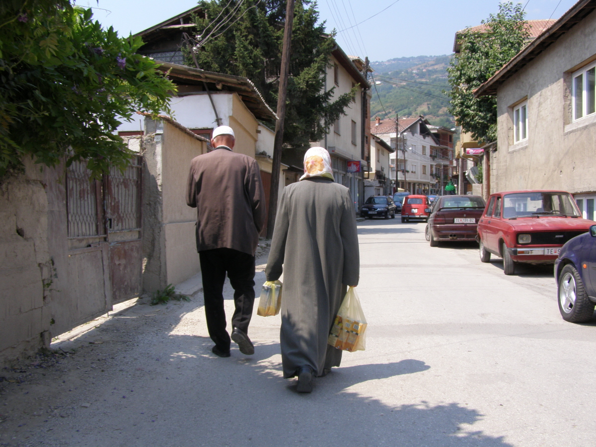 Tetovo.